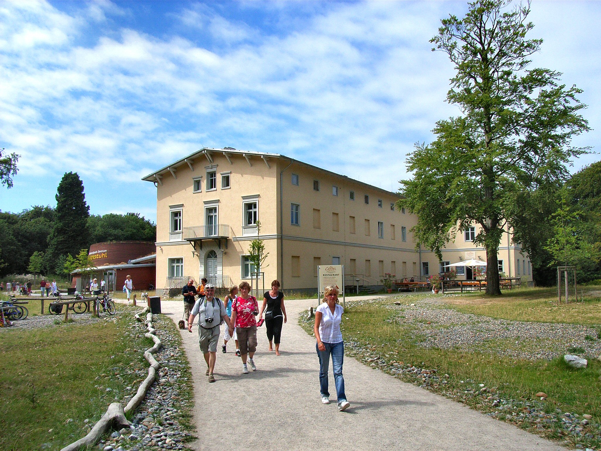 Nationalpark-Zentrum Königsstuhl im Nationalpark Jasmund auf der Insel Rügen.